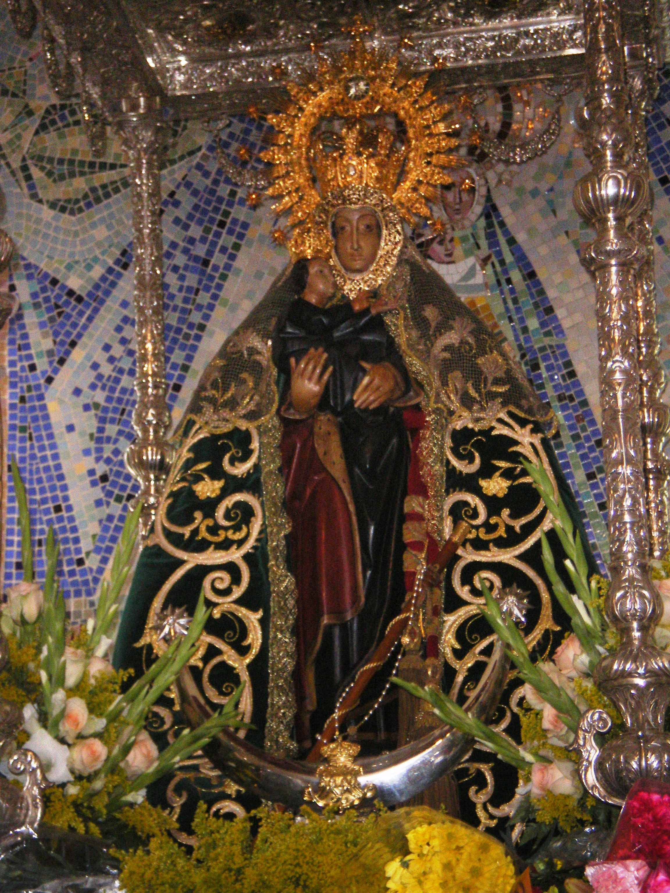 Fotografía de la imagen de la Virgen del Mar, Patrona de Almería, Andalucía, España, en el interior de la Ermita de Torre García durante la Romería.